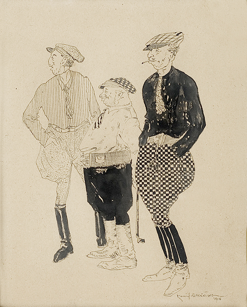 Przed wyścigiem